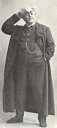 Nils Arehn